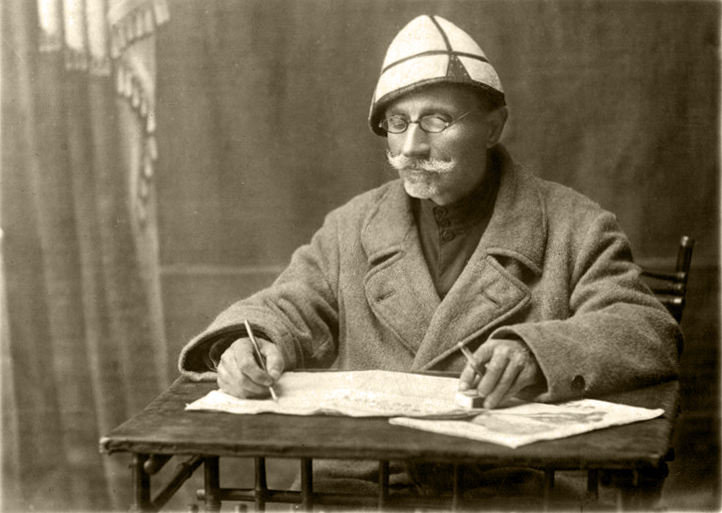 ლადო ბზვანელი